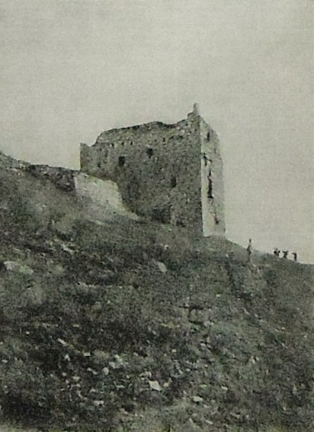 Vecchia illustrazione delle rovine del Castello dei Ventimiglia, Alcamo